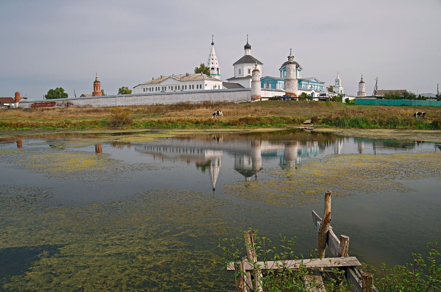 Ансамбль Богородице-Рождественского Бобренева монастыря (Москва и Московская область, Коломна, село Старое Бобренево)